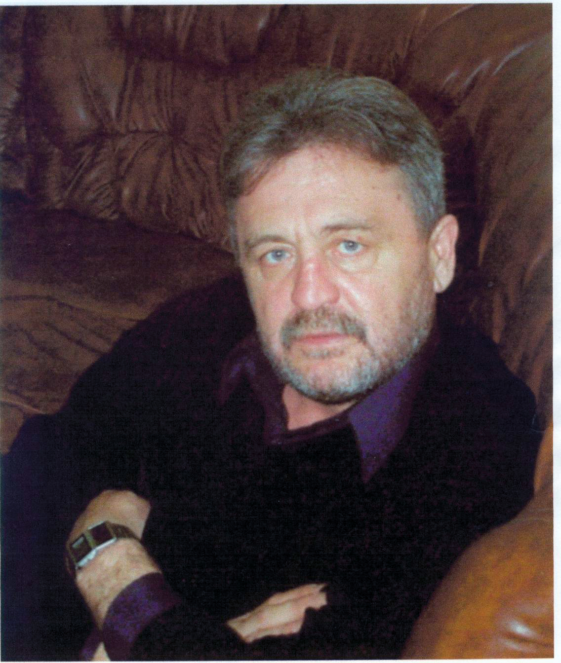 Молдавский, российский и советский кинорежиссёр и сценарист Валериу Жереги